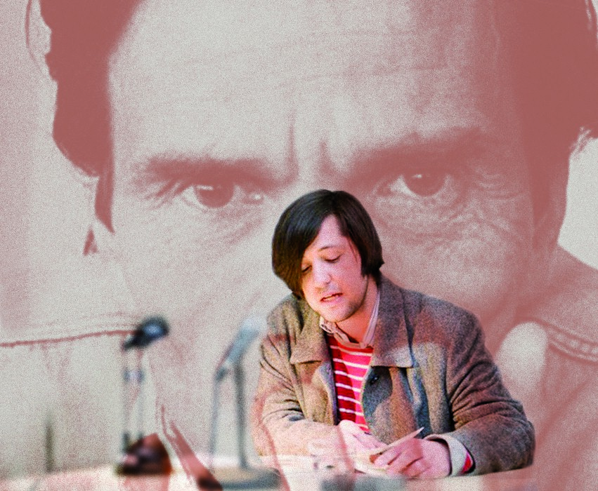 Christian Filips bei einer Lesung in Linz, 2010